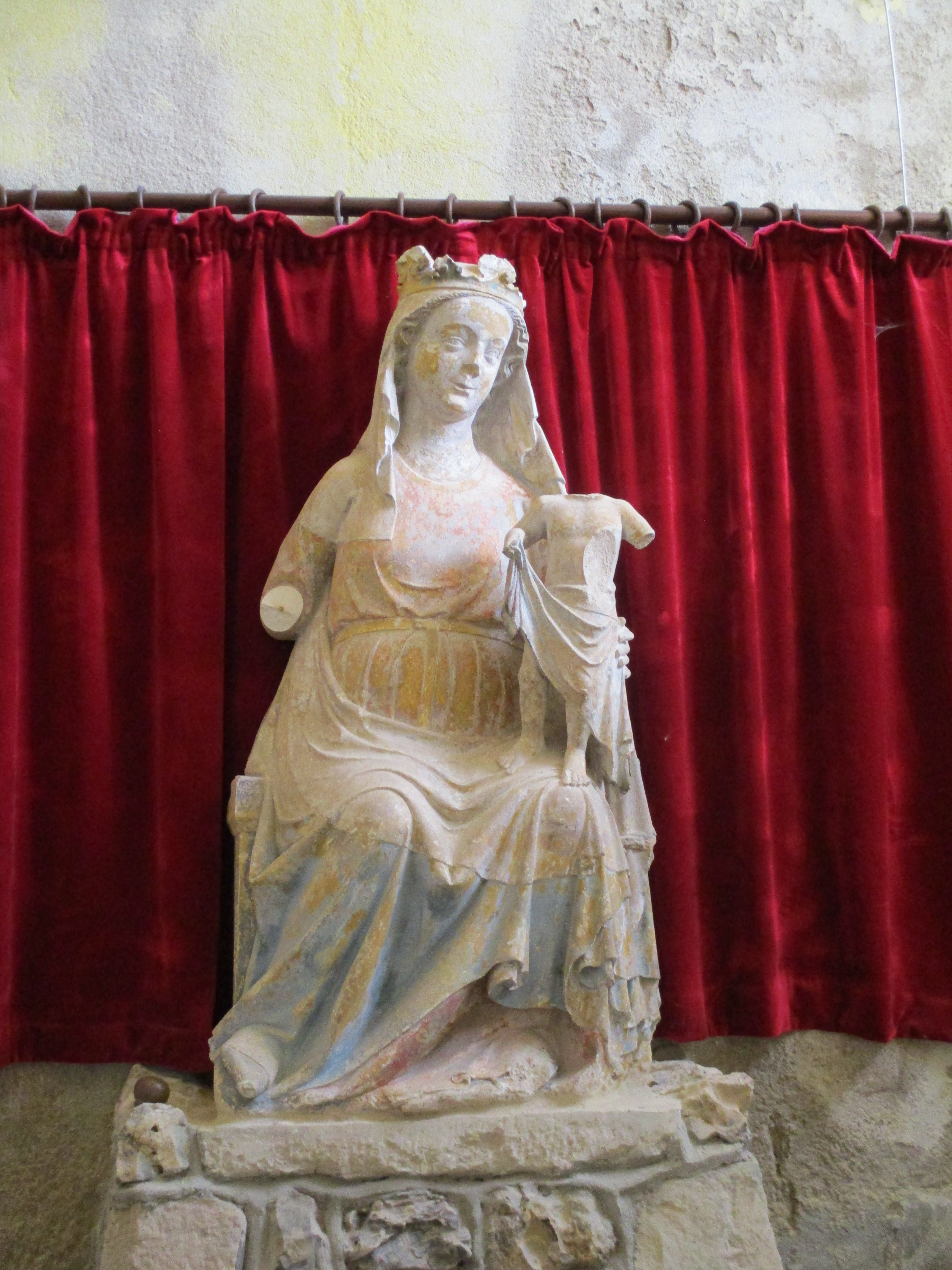 Vierge à l'Enfant de l'église Saint-Gervais-et-Saint-Protais de Dixmont (Yonne).